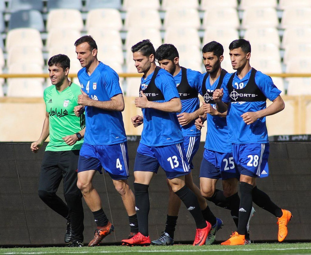 تمرین تیم ملی فوتبال ایران زیر نظر کارلوس کی‌روش